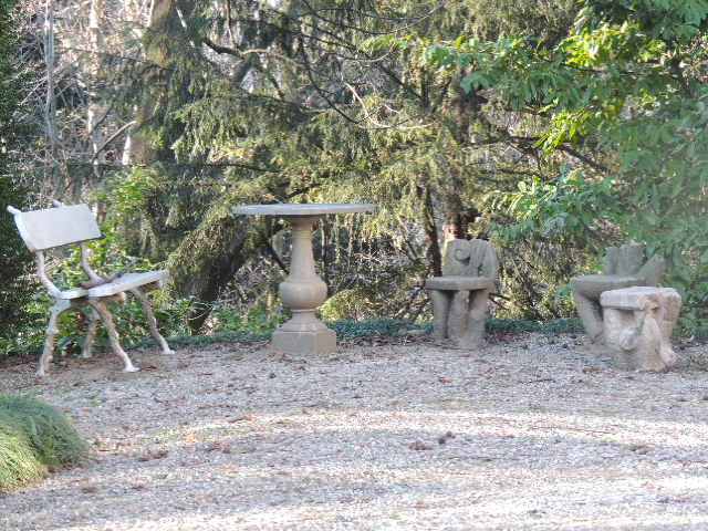 piazzale villa carcano